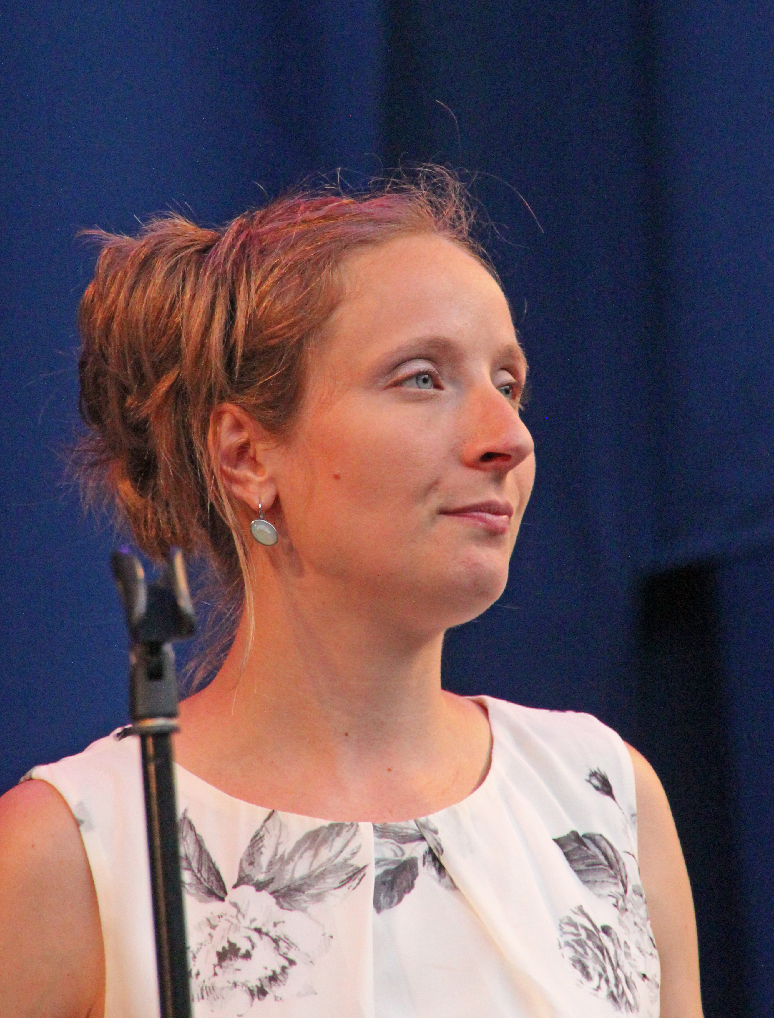 Bildinhalt: Die Sängerin Sarah Buechi bei einem Auftritt des Christoph-Stiefel-Septetts im Palmengarten Aufnahmeort: Frankfurt am Main, Deutschland Die dargestellte Person wurde bei einem öffentlichen Auftritt fotografiert.